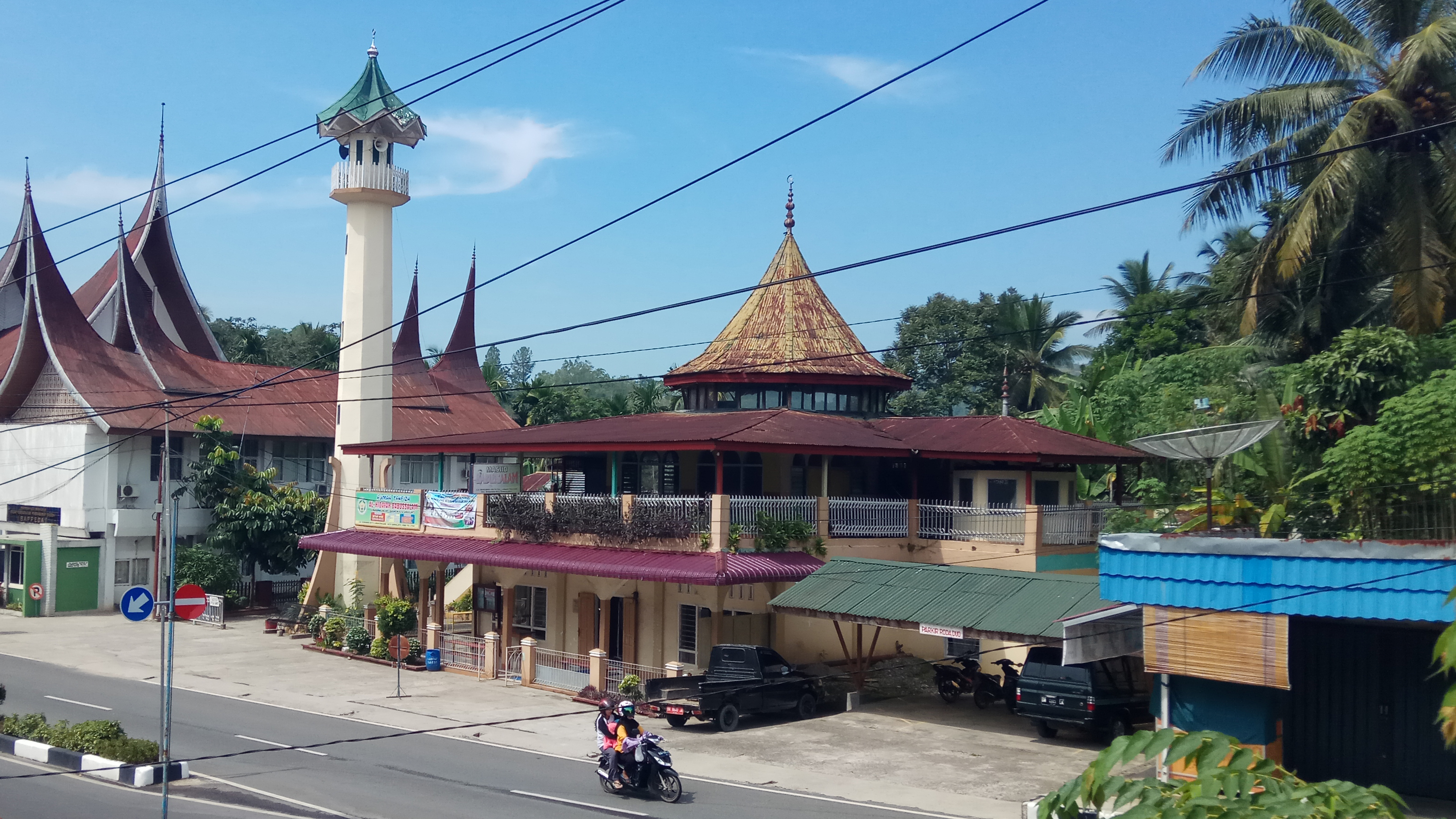 Masjid Babussalam adalah salah satu masjid yang terletak di Kelurahan Lubang Panjang, Kecamatan Barangin, Kota Sawahlunto, Sumatera Barat. Lokasinya berada di sebelah Balai kota Sawahlunto.